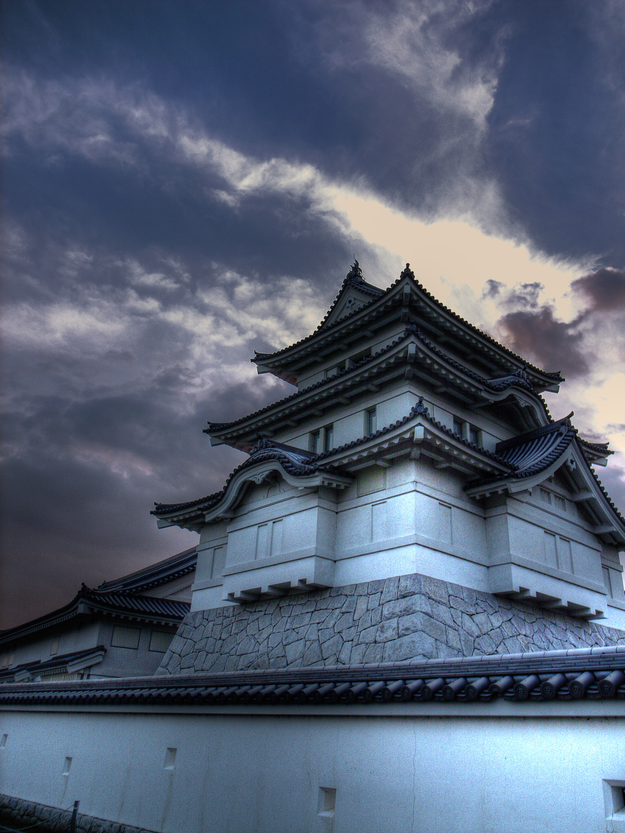 千葉県立関宿城博物館。関宿城所在地は、70m下流。